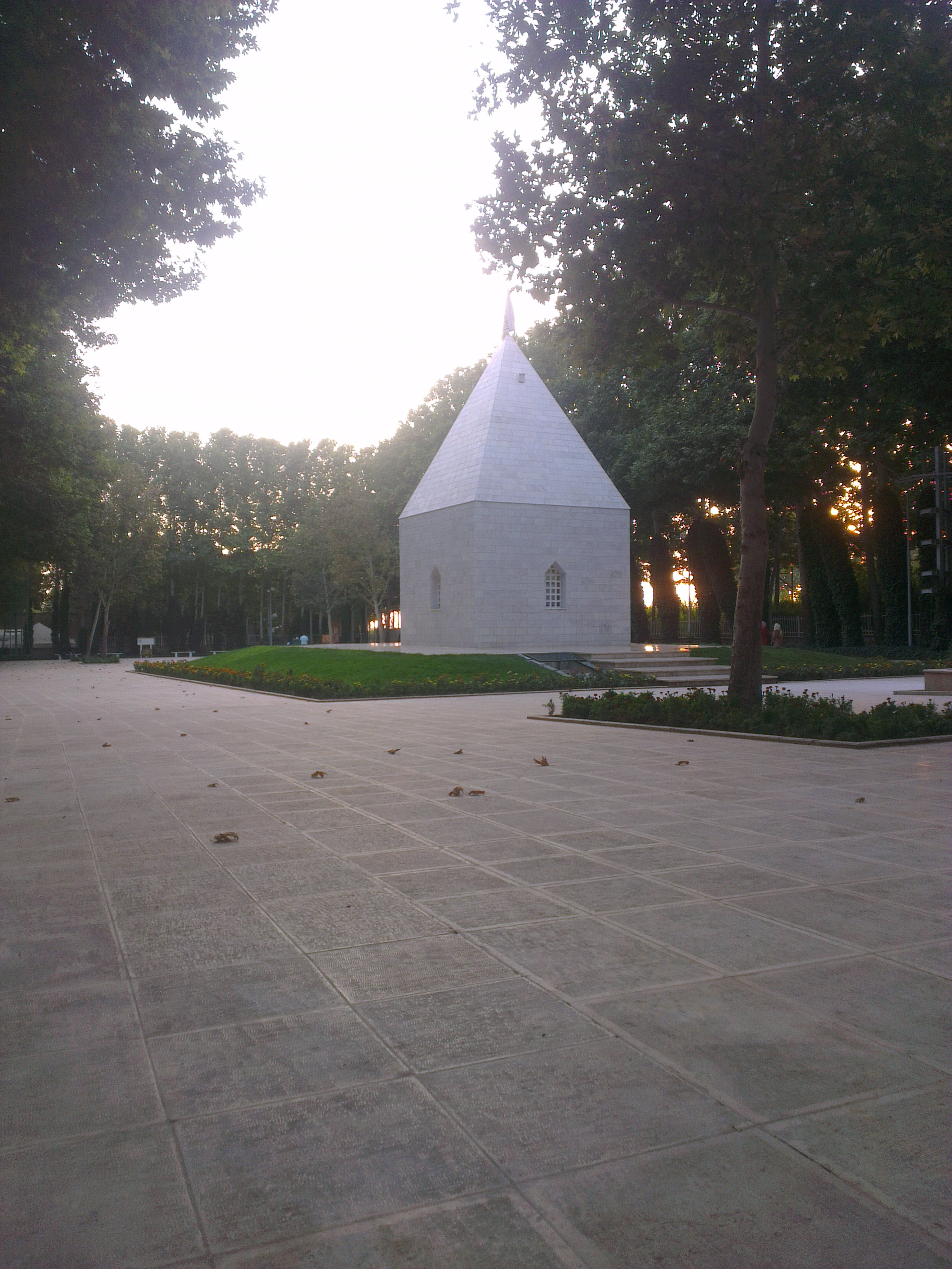 این تصویر یادبودی را نشان می‌دهد که بر مزار نورعلی الهی واقع در هشتگرد، کوی نور را نشان می‌دهد.